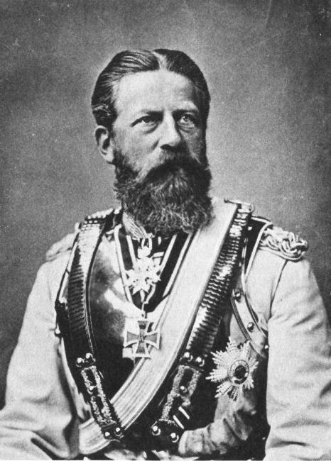 Der spätere Friedrich III., Deutscher Kaiser 1887